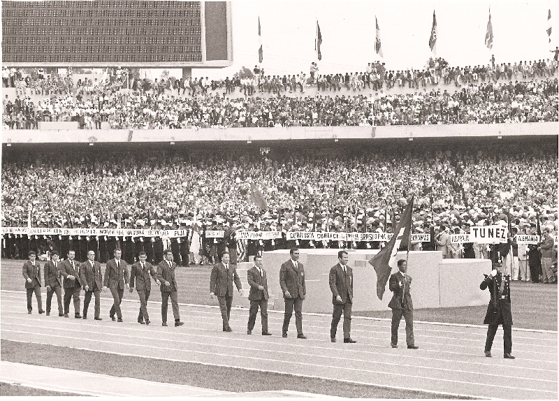 Défilé de la délégation tunisienne lors de la cérémonie d'ouverture des Jeux olympiques d'été de 1968 à Mexico